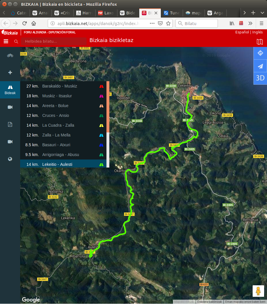 Lekeitio-Aulesti bidegorriaren mapa